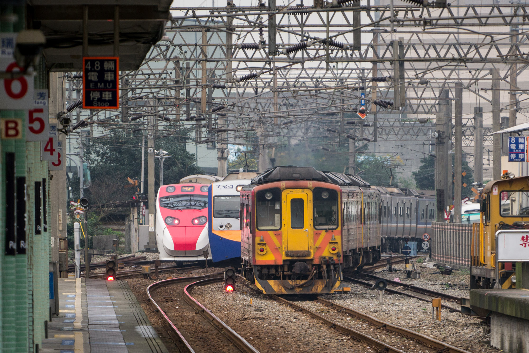 臺灣鐵路管理局瑞芳車站，第211車次普悠瑪號（TEMU2000）逆行宜蘭線，第4162車次區間車（EMU700）順行宜蘭線，第4713車次區間車（DR1000）逆行深澳線。